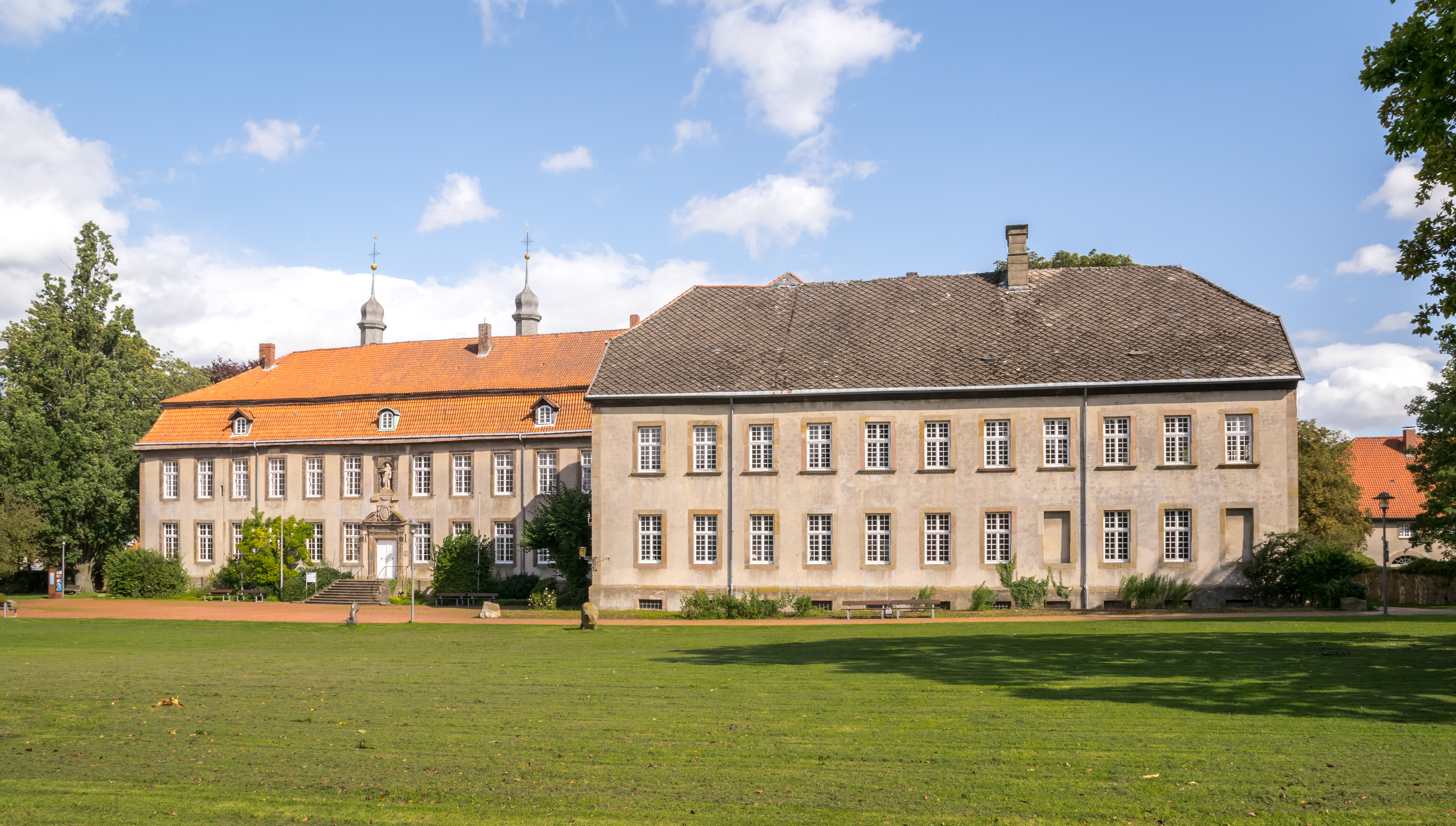 Kloster Willebadessen, ehemaliges Konventsgebäude und Abtei